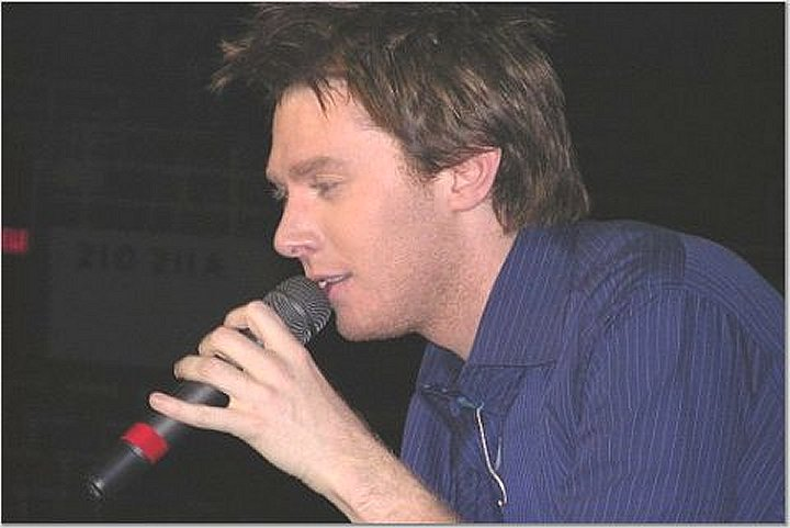 Clay Aiken Independent Tour @ Joe Lewis Arena, Detroit, MI